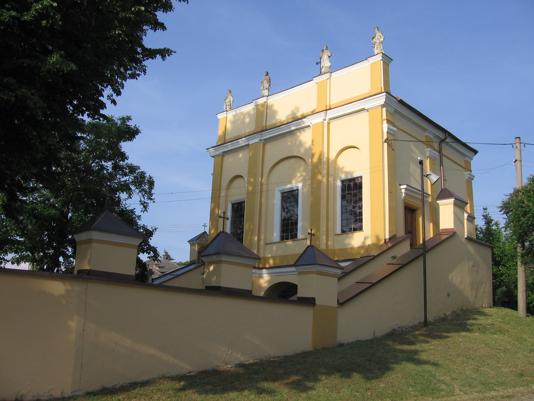 Kategória:Obrázky budov Kategória:Presunúť na Commons